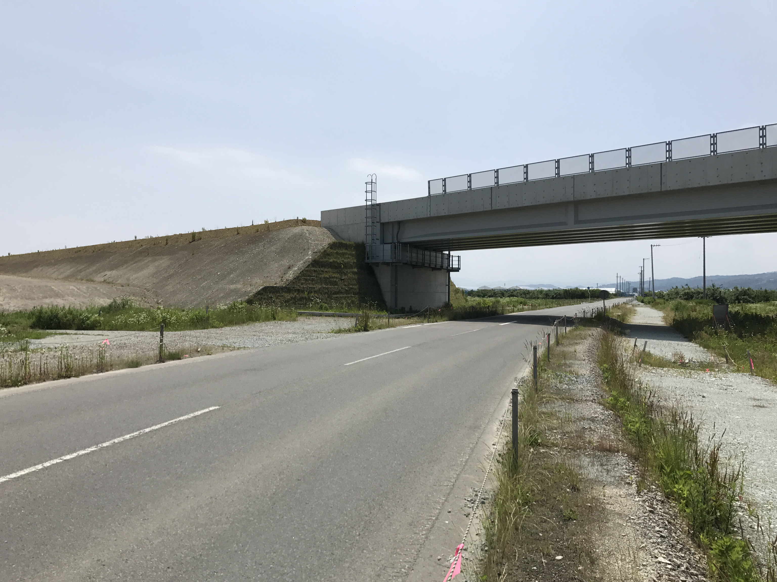 建設中の東北中央自動車道 東根北IC